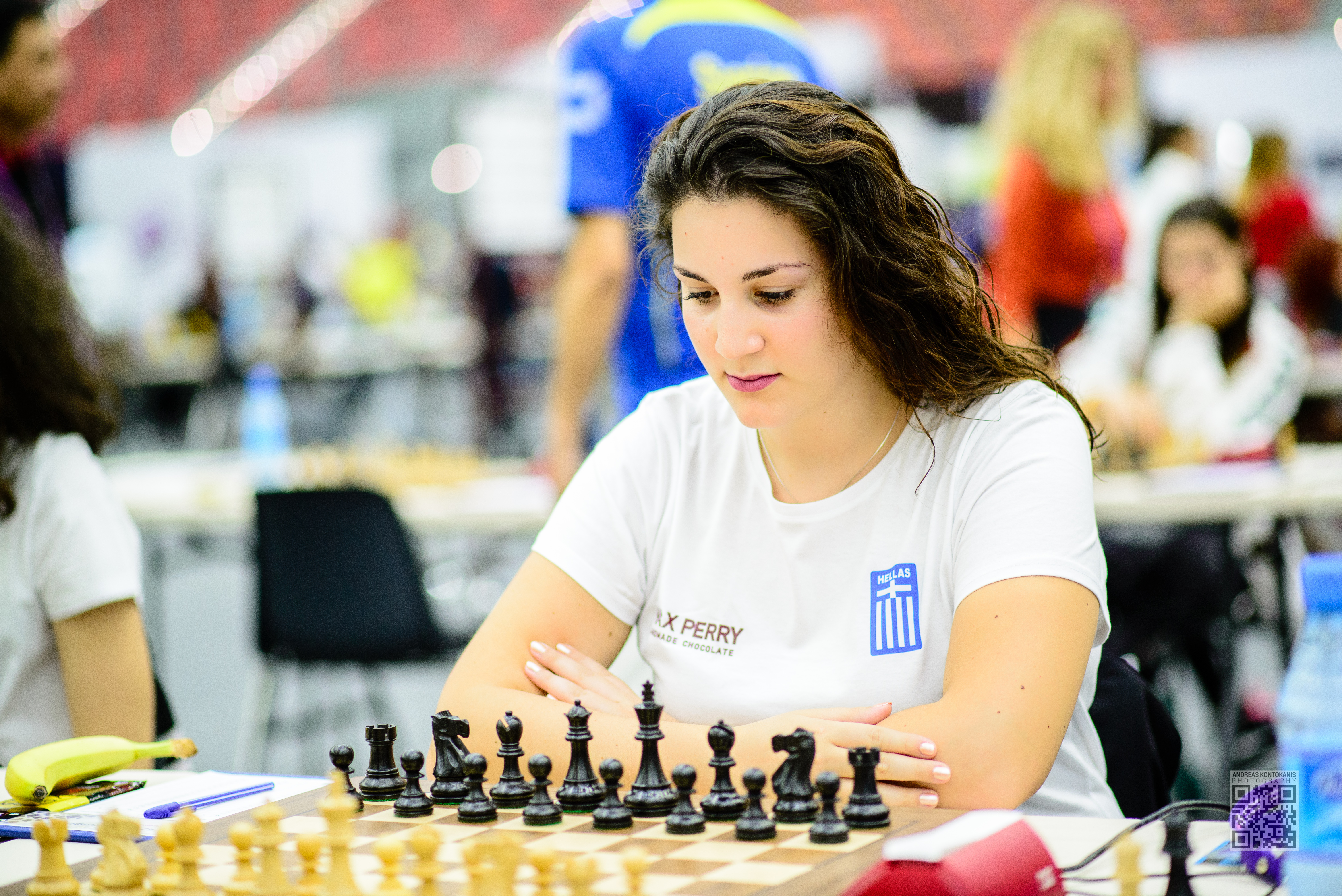 Pavlidou Ekaterini